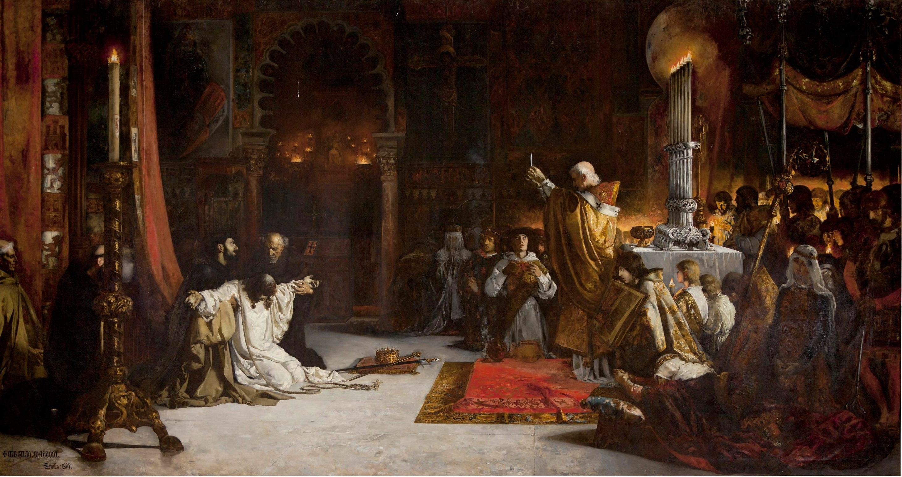 La obra representa los últimos momentos del rey Fernando III de Castilla († 1252), apodado el Santo, que falleció en la ciudad de Sevilla el día 30 de mayo de 1252, y es considerada la obra cumbre del pintor sevillano Virgilio Mattoni. Este lienzo fue pintado para la Exposición Nacional de 1887, donde fue premiado con la segunda medalla, y el modo en que quedó representada la muerte del monarca está inspirado en un fragmento de la Crónica de España, que fue compuesta durante el reinado de su propio hijo y heredero, Alfonso X el Sabio.